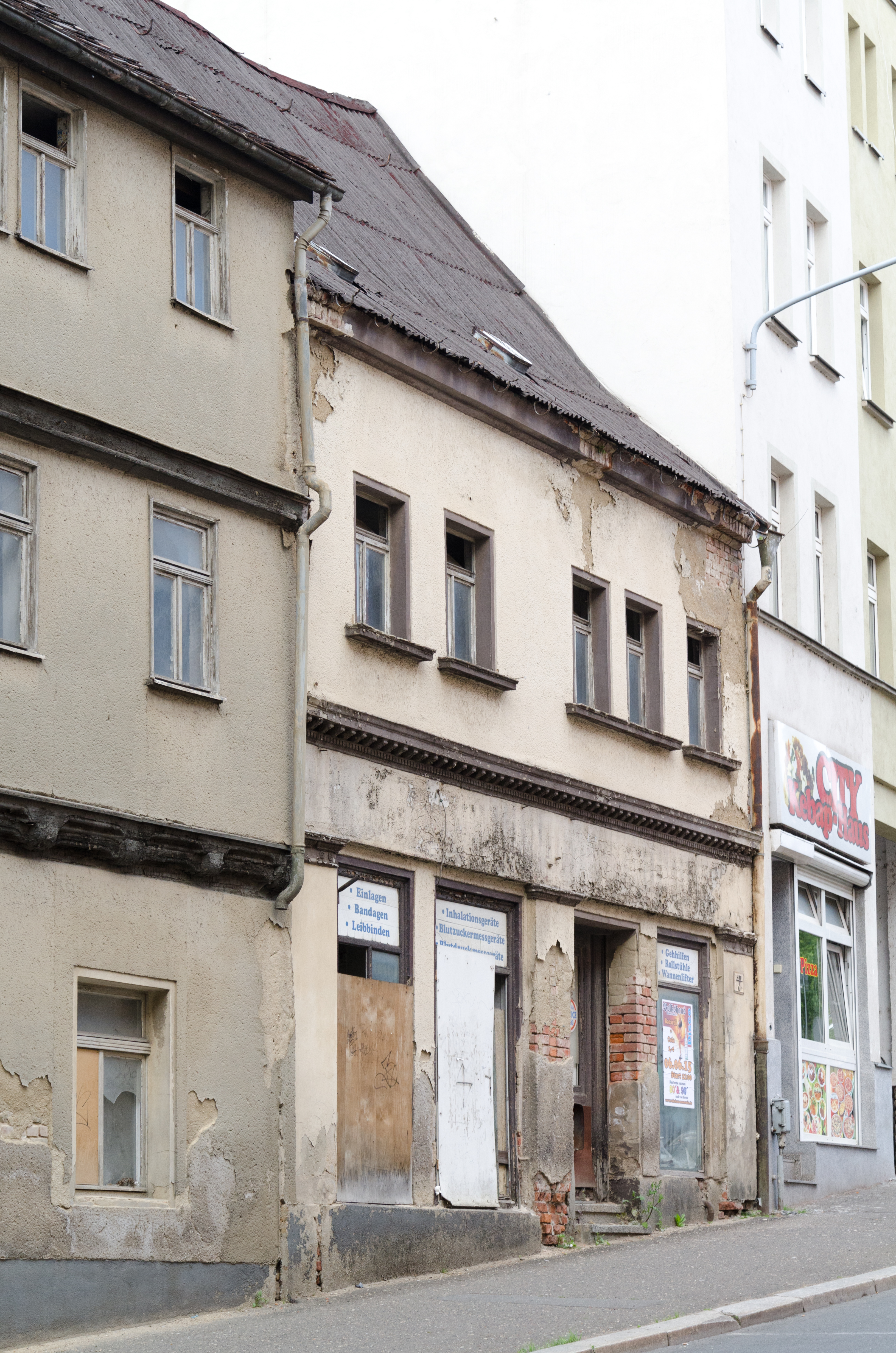 Zeitz, Rahnestraße 3